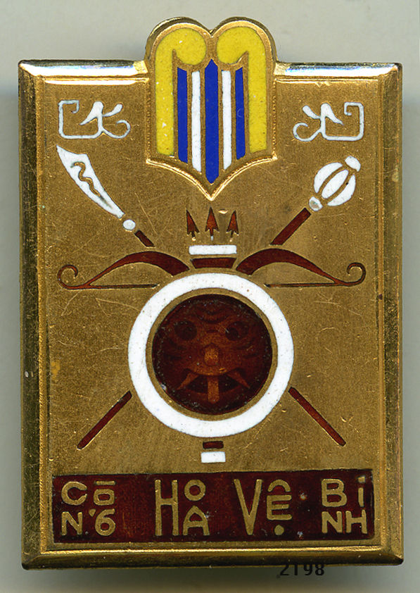 Phù hiệu lực lượng Cộng hòa Vệ binh Nam Kỳ (Insigne Garde Républicaine Cochinchinoise), 1946 - 1948.